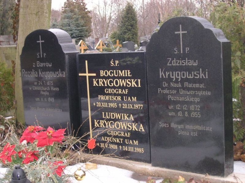 Groby prof. Zdzisława Krygowskiego i prof. Bogumiła Krygowskiego, Cmentarz Parafialny św. Jana Vianneya w Poznaniu